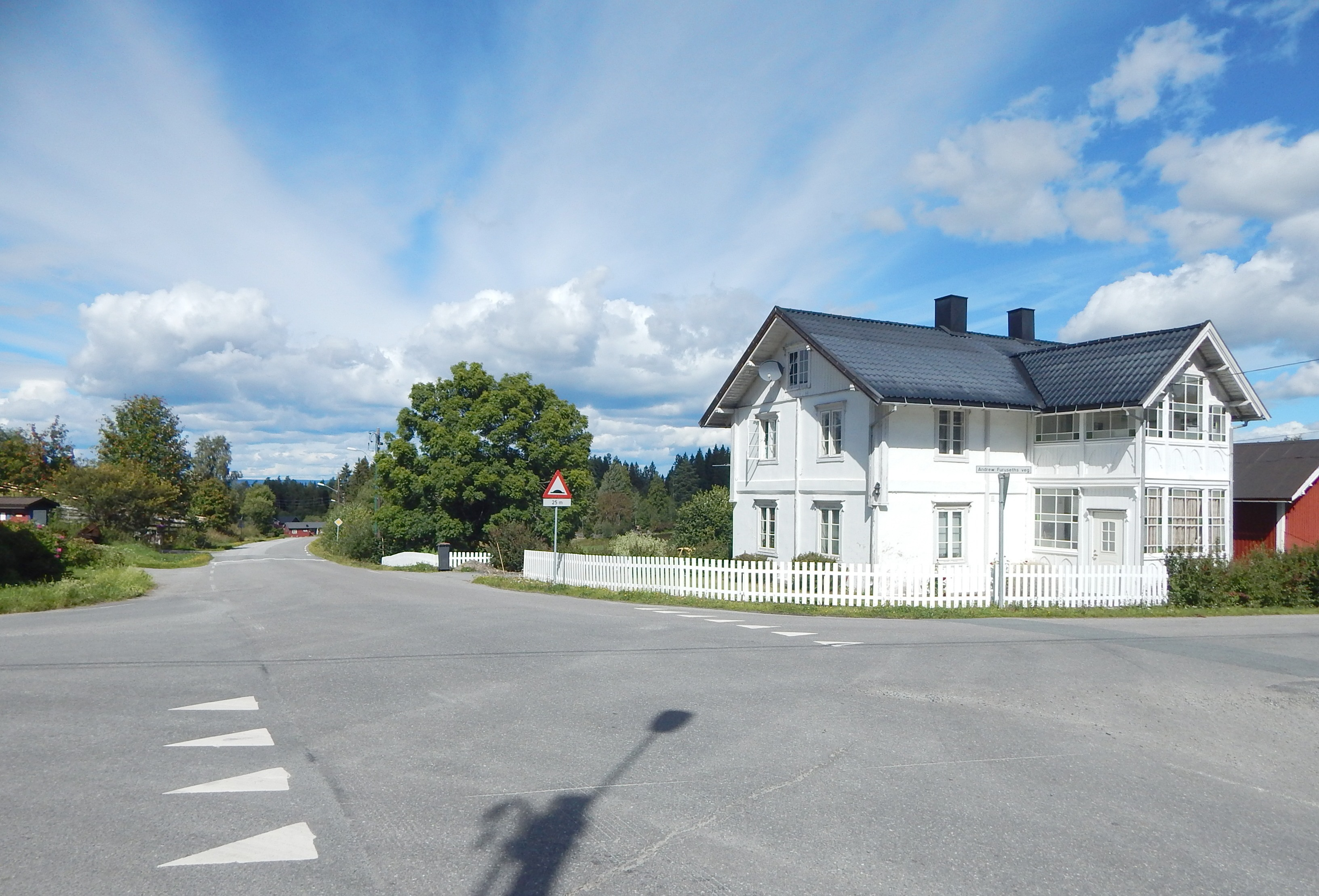 Åsvangvegen (fylkesvei 1914, tidl. 238) vestover i krysset med fylkesvei 1886 (tidl. 220) i Åsvang